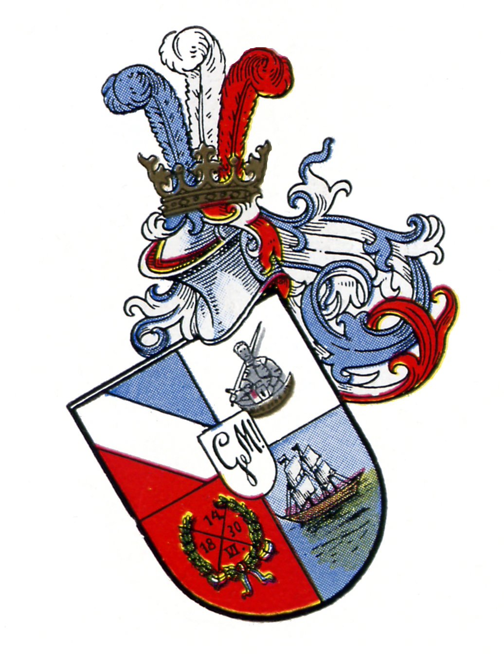 Wappen des Corps Masovia Königsberg zu Potsdam